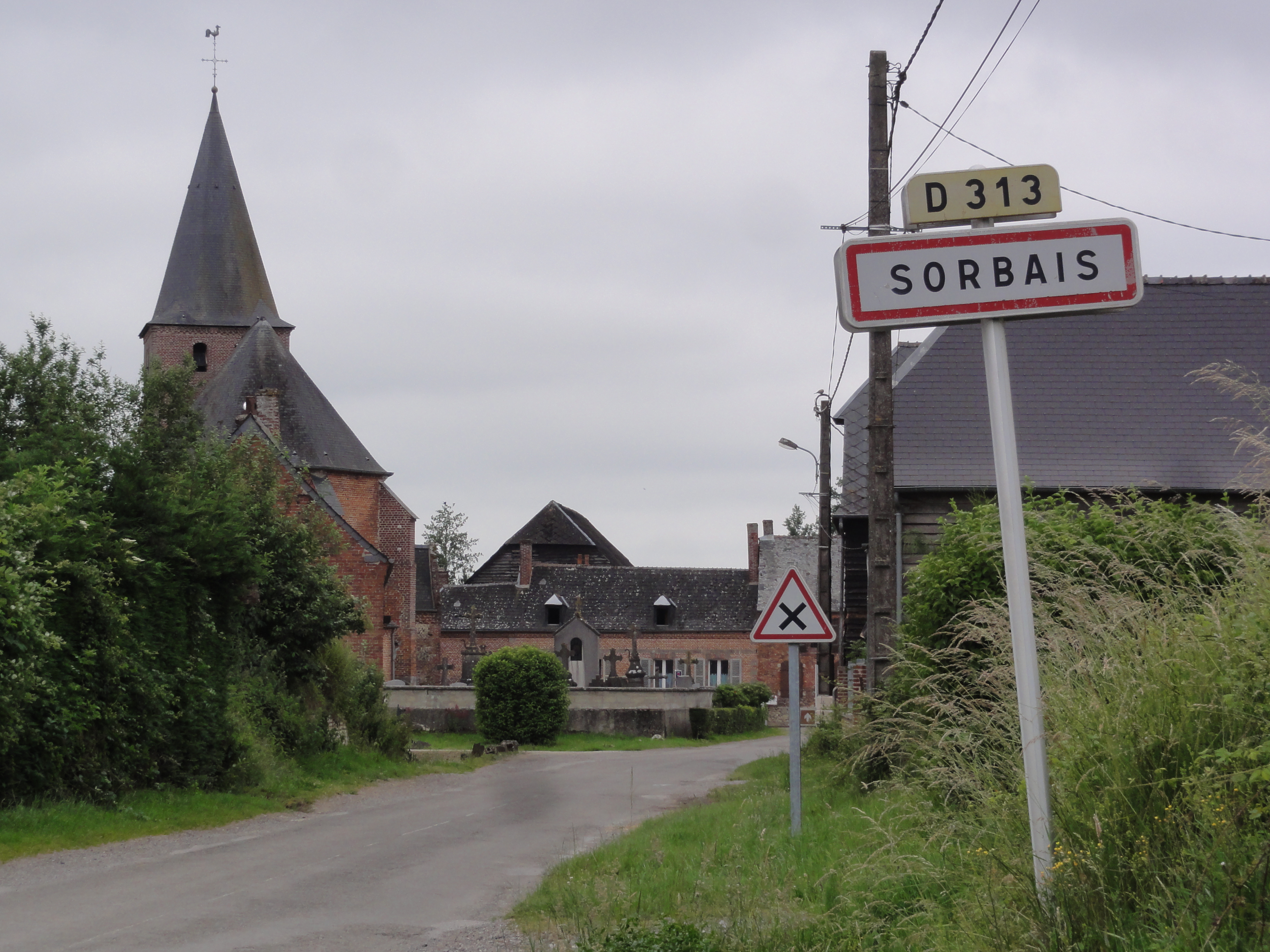 Sorbais (Aisne) city limit signet and church